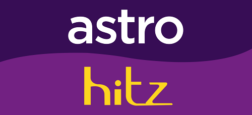 Logo saluran Astro Hitz